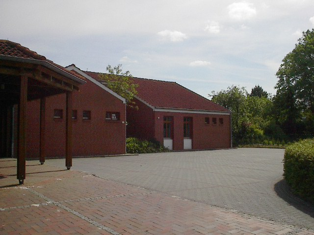 gemeindehaus